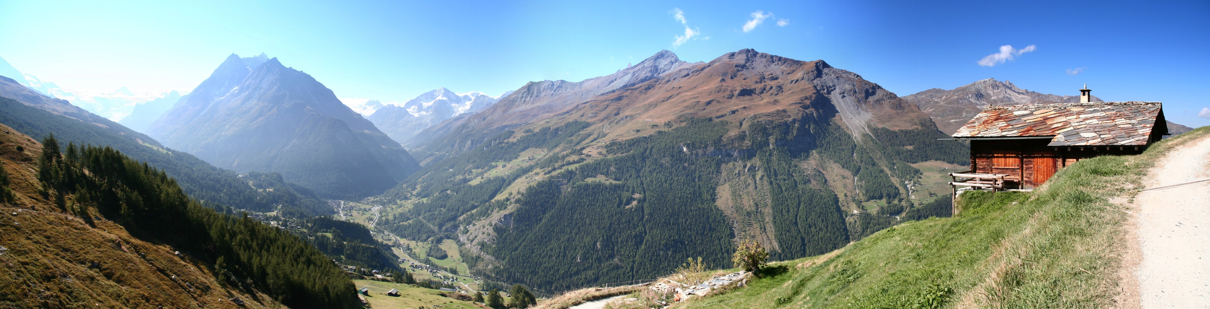 Vue sur Les Haudères, Val d'Hérens, Valais, Suisse